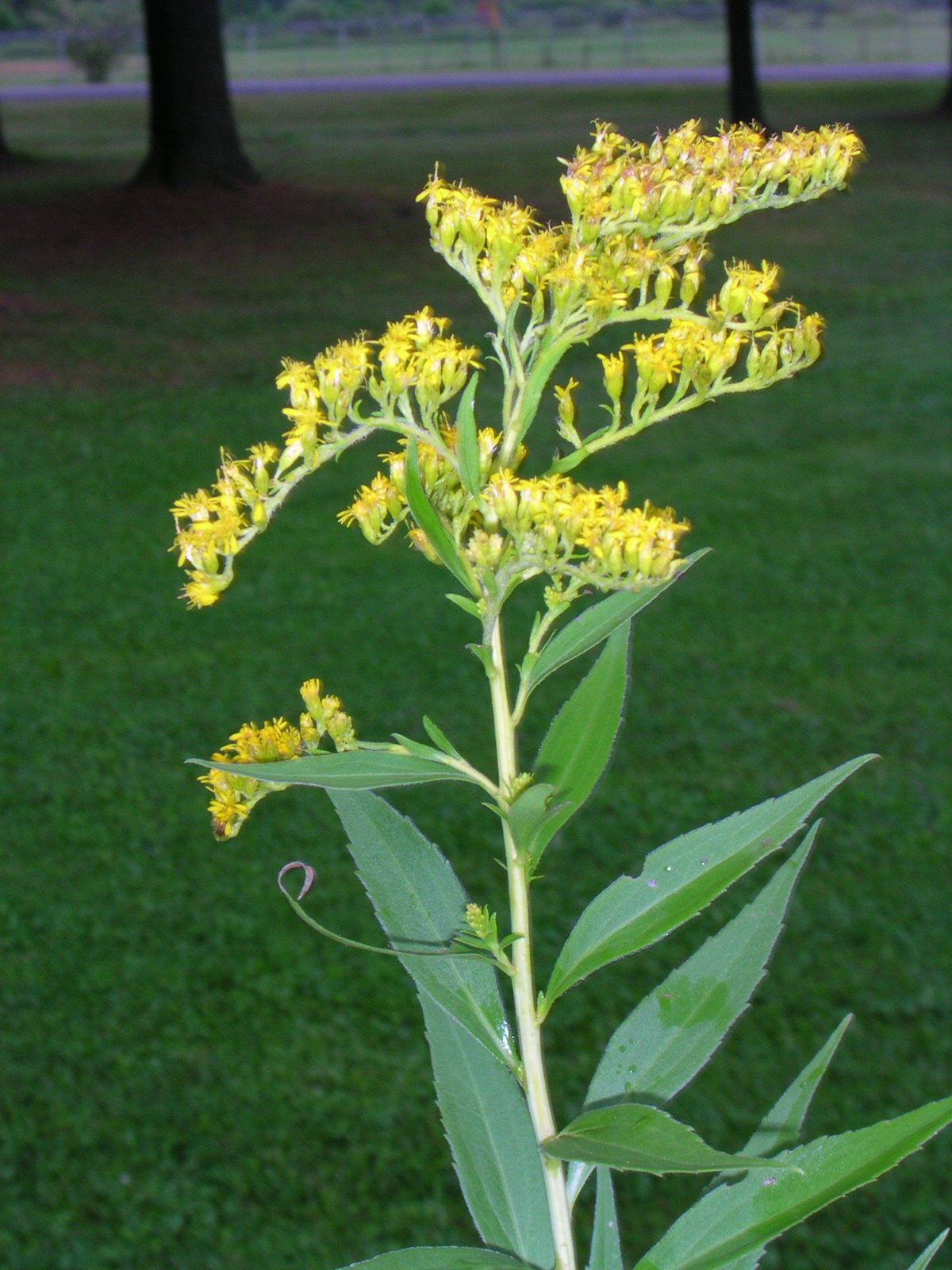 Solidago_canadense_1-jgreenlee